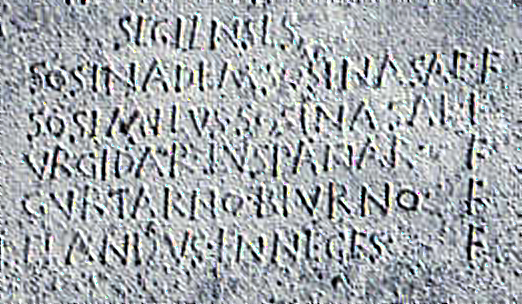 Detalle bronce de Ascoli